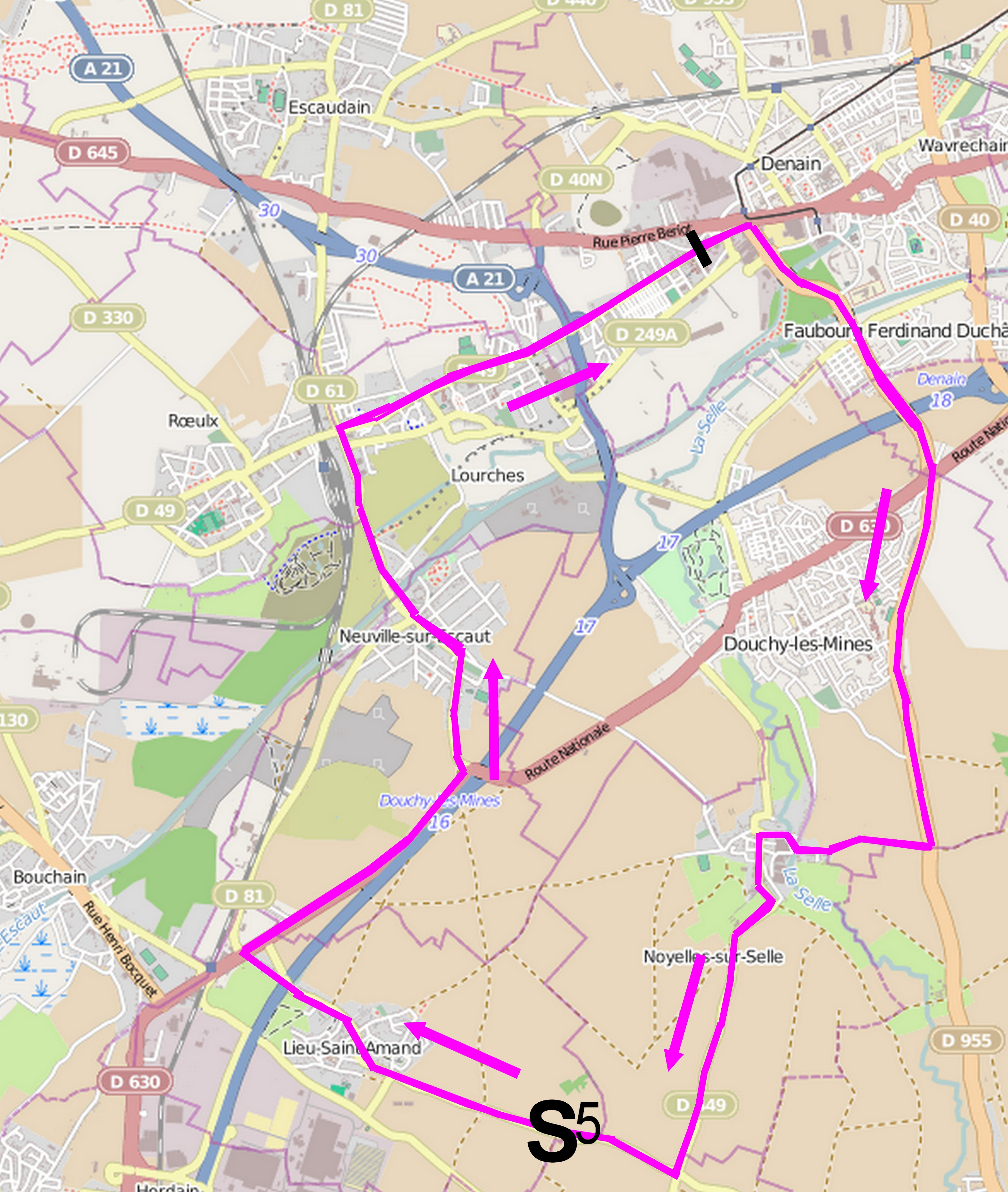 Reportage réalisé le jeudi 17 avril à l'occasion du départ et de l'arrivée du Grand Prix de Denain 2014 à Denain, Nord, Nord-Pas-de-Calais, France.